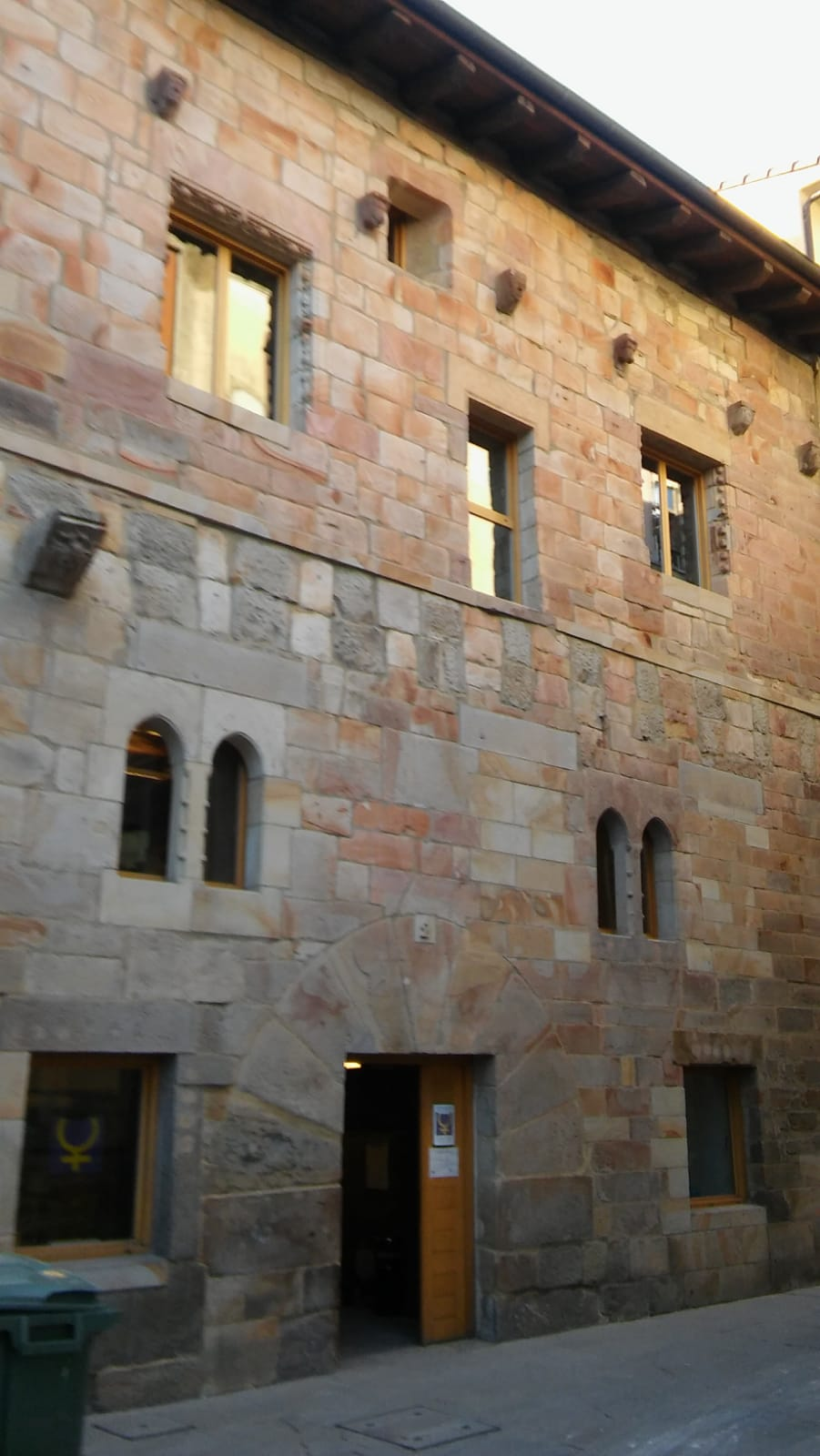 Casa de la mujer Durango. Andragunea